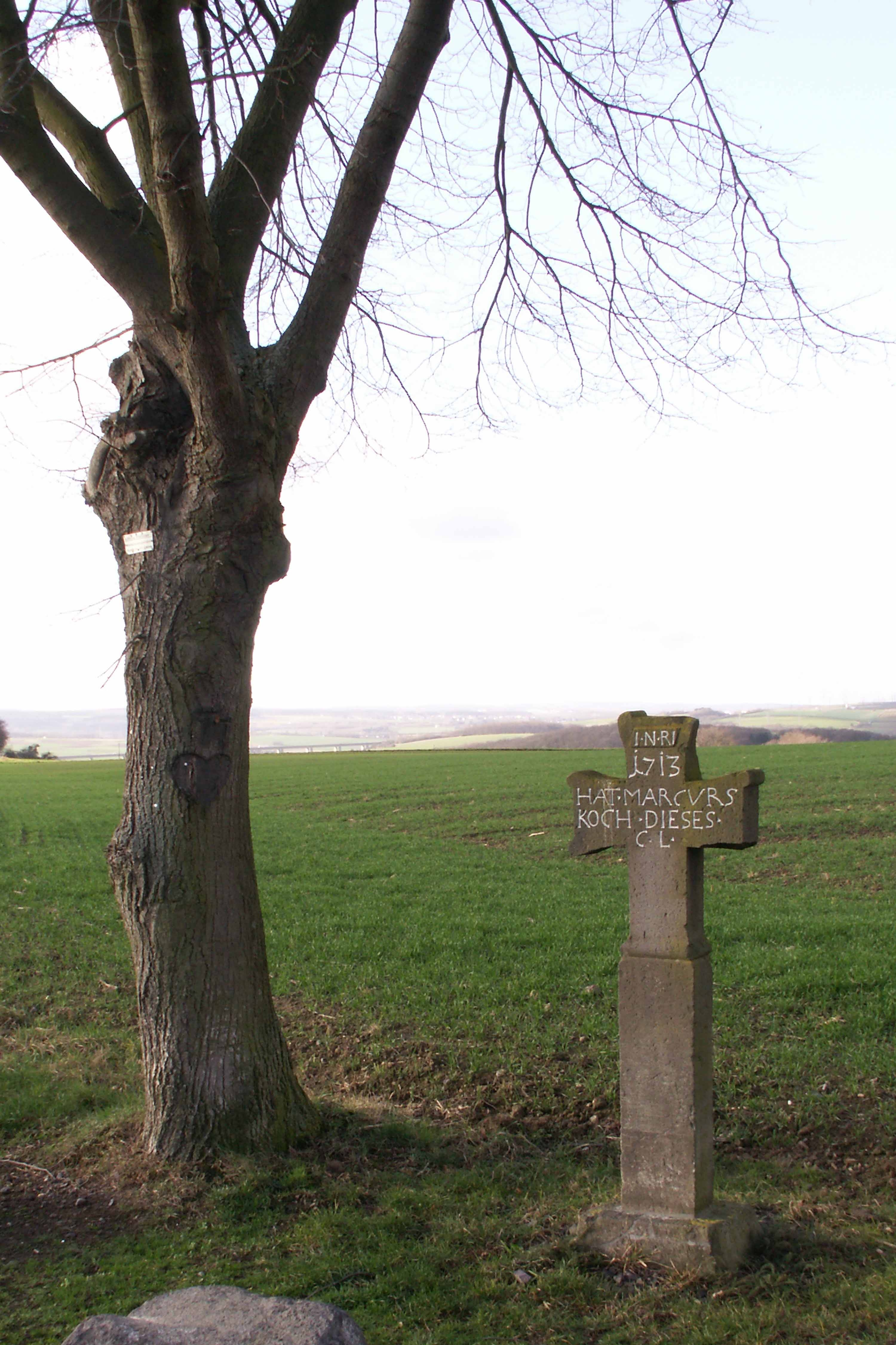 Basaltkreuz